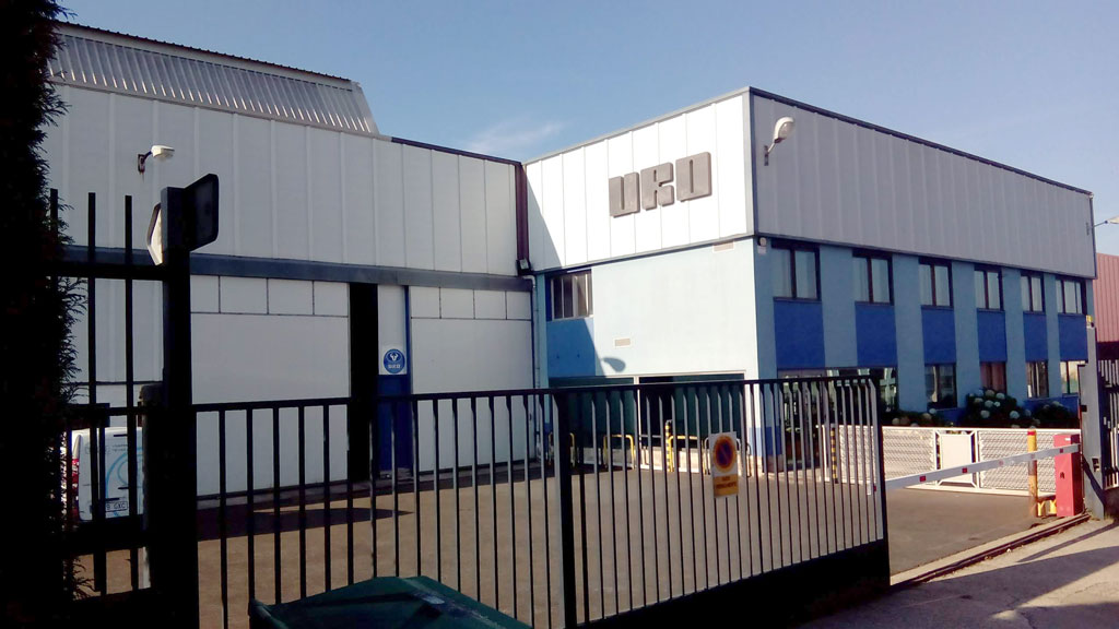 Urovesa, Tambre.